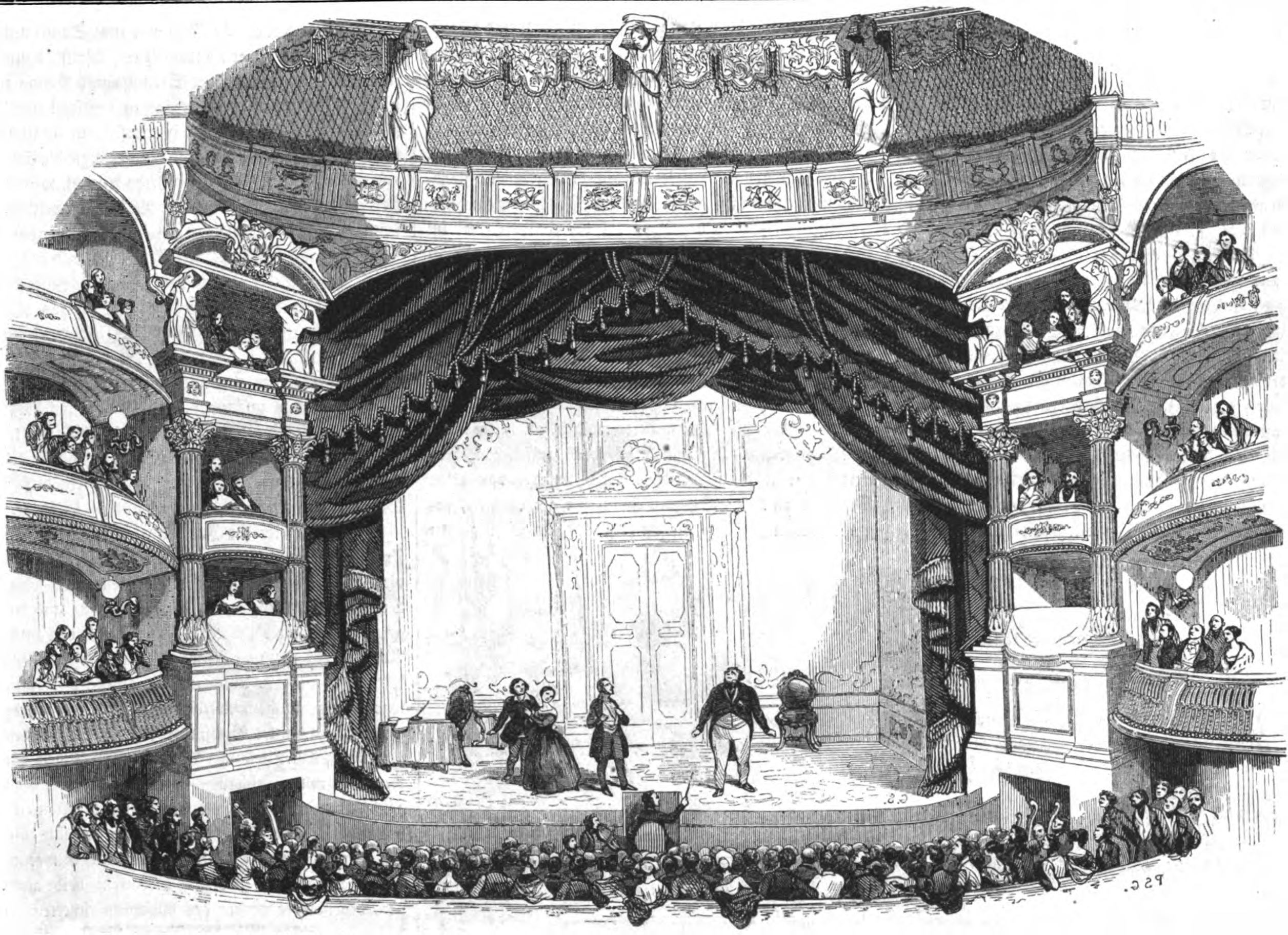 Oper "Don Pasquale", 2. Akt, Aufführung im Theater Ventadour in Paris, 1843.